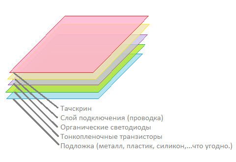 Схема Super AMOLED экрана